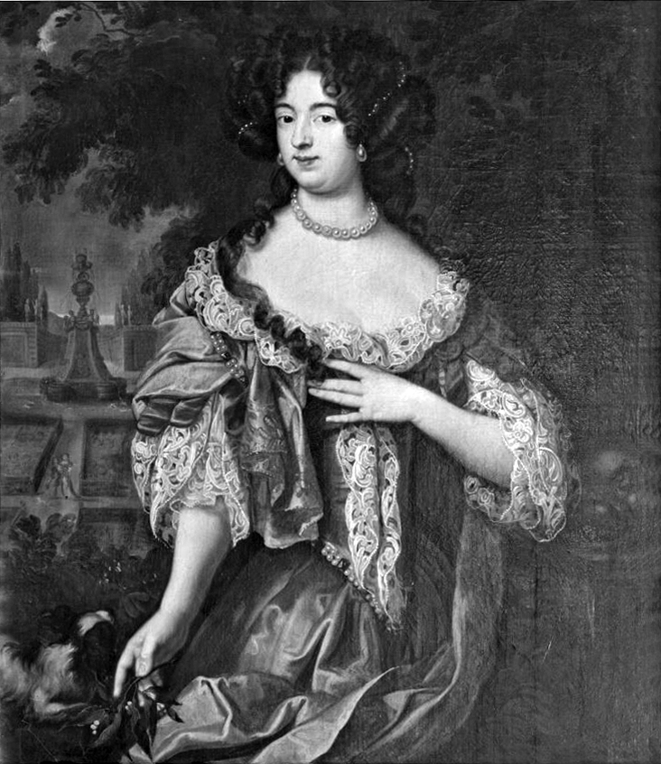 Dorothea, Prinzessin von Holstein-Glücksburg, 2. Gemahlin des großen Kurfürsten Frederick William von Brandenburg Dessau, Staatliches Museum Schloß Mosigkau?